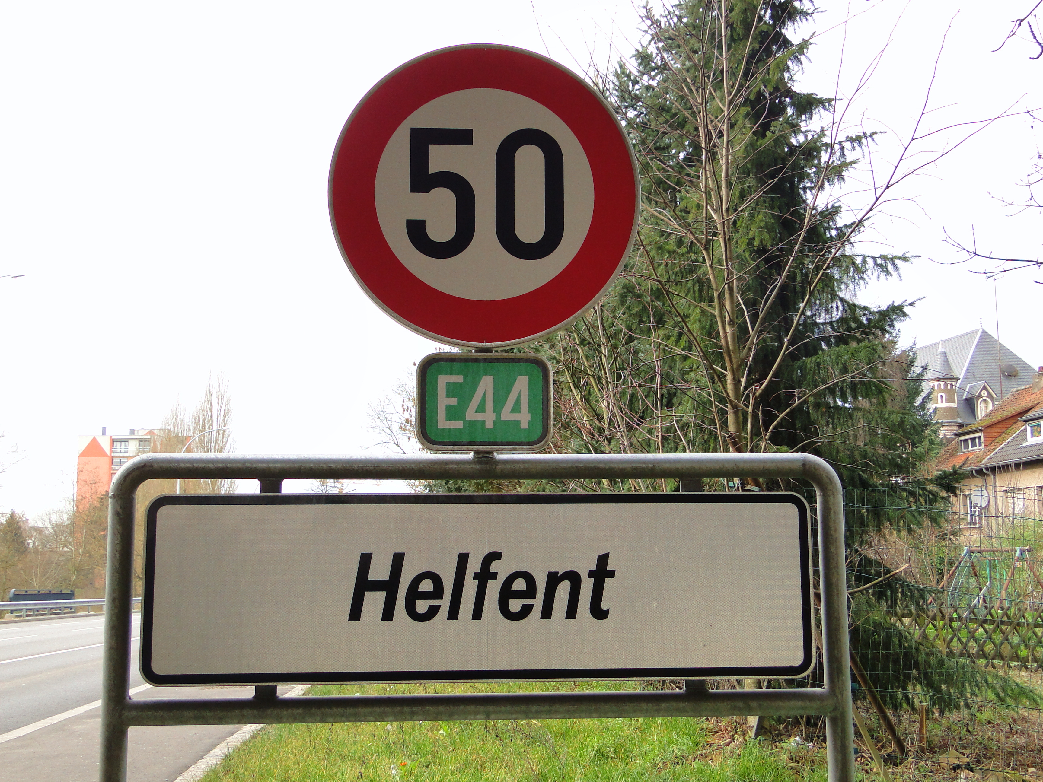 Verkéiersschëld F,14a "Ufank Lieu-dit" aus dem lëtzebuerger Code de la Route.